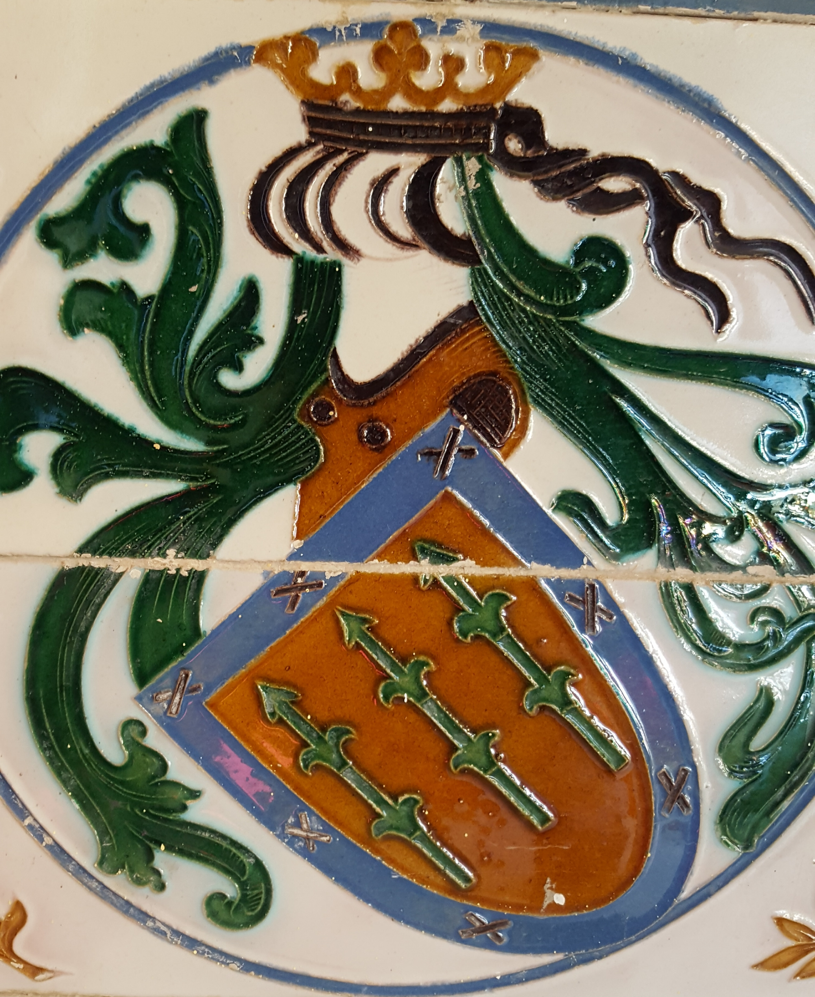 Escudo de la familia de los Cañaveral en un azulejo del castillo de Láchar (provincia de Granada, España)